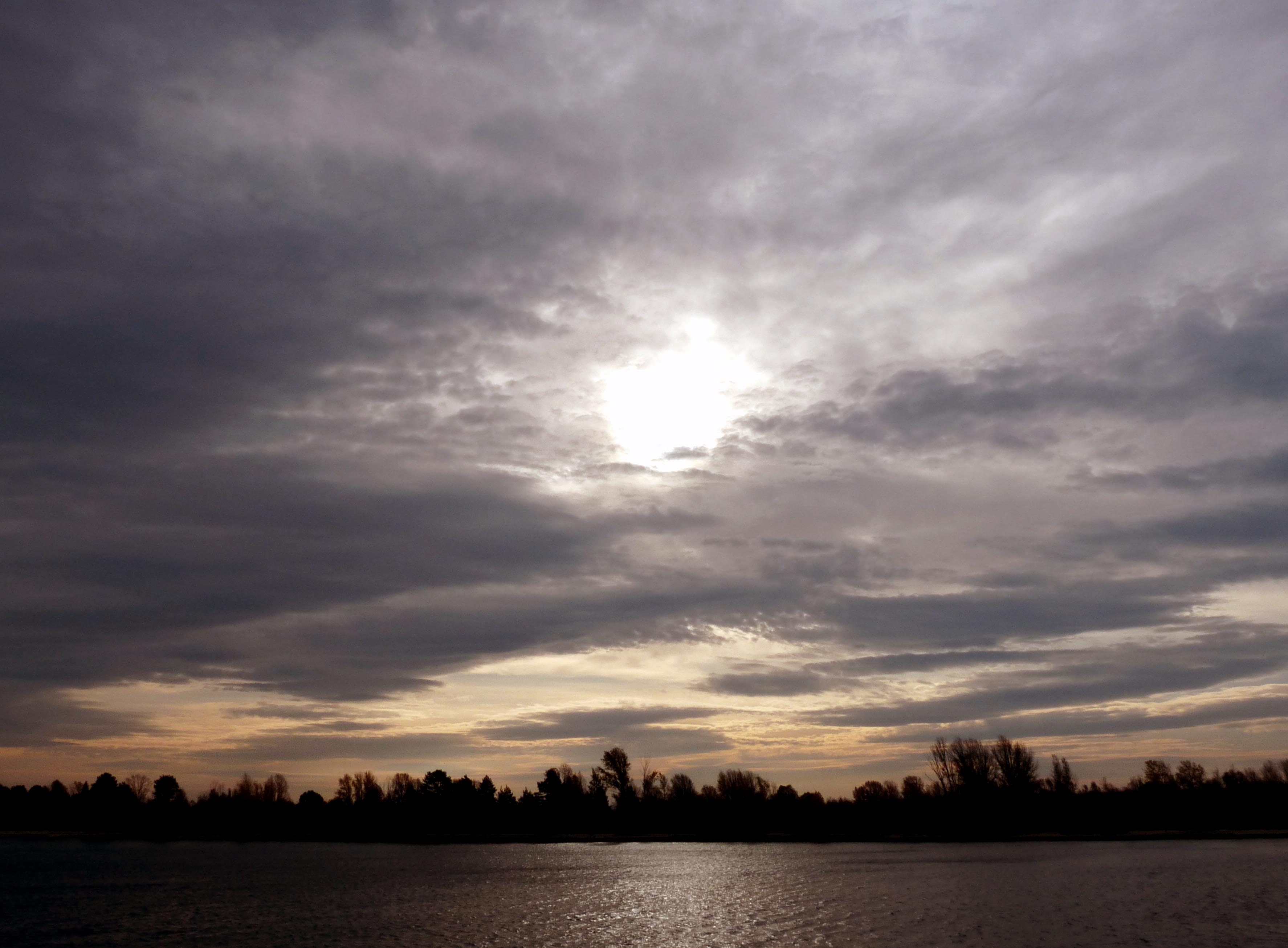 Riverbank before Kazan Kazan 02